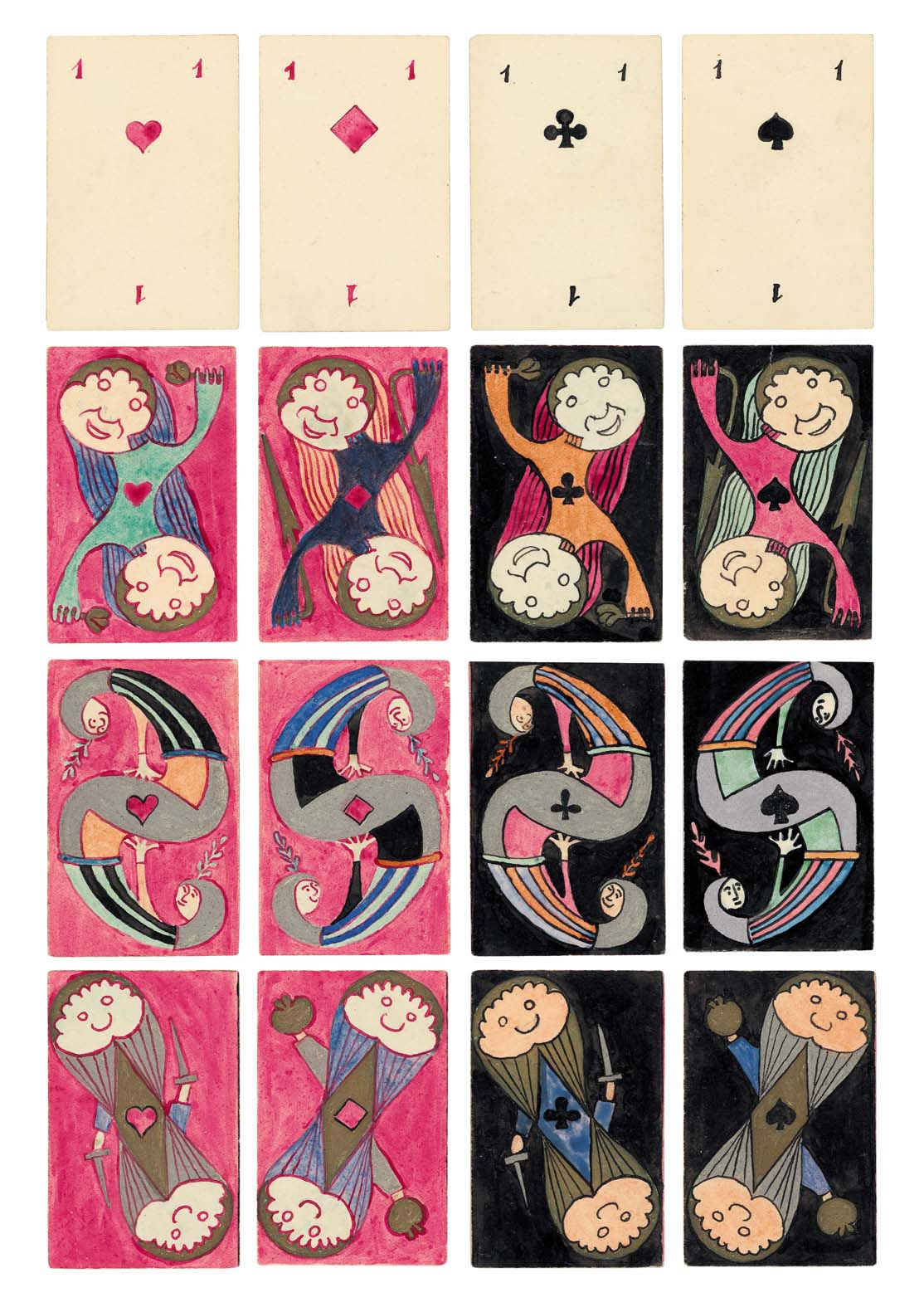 Design eines Sets Spielkarten von Arnold Schönberg